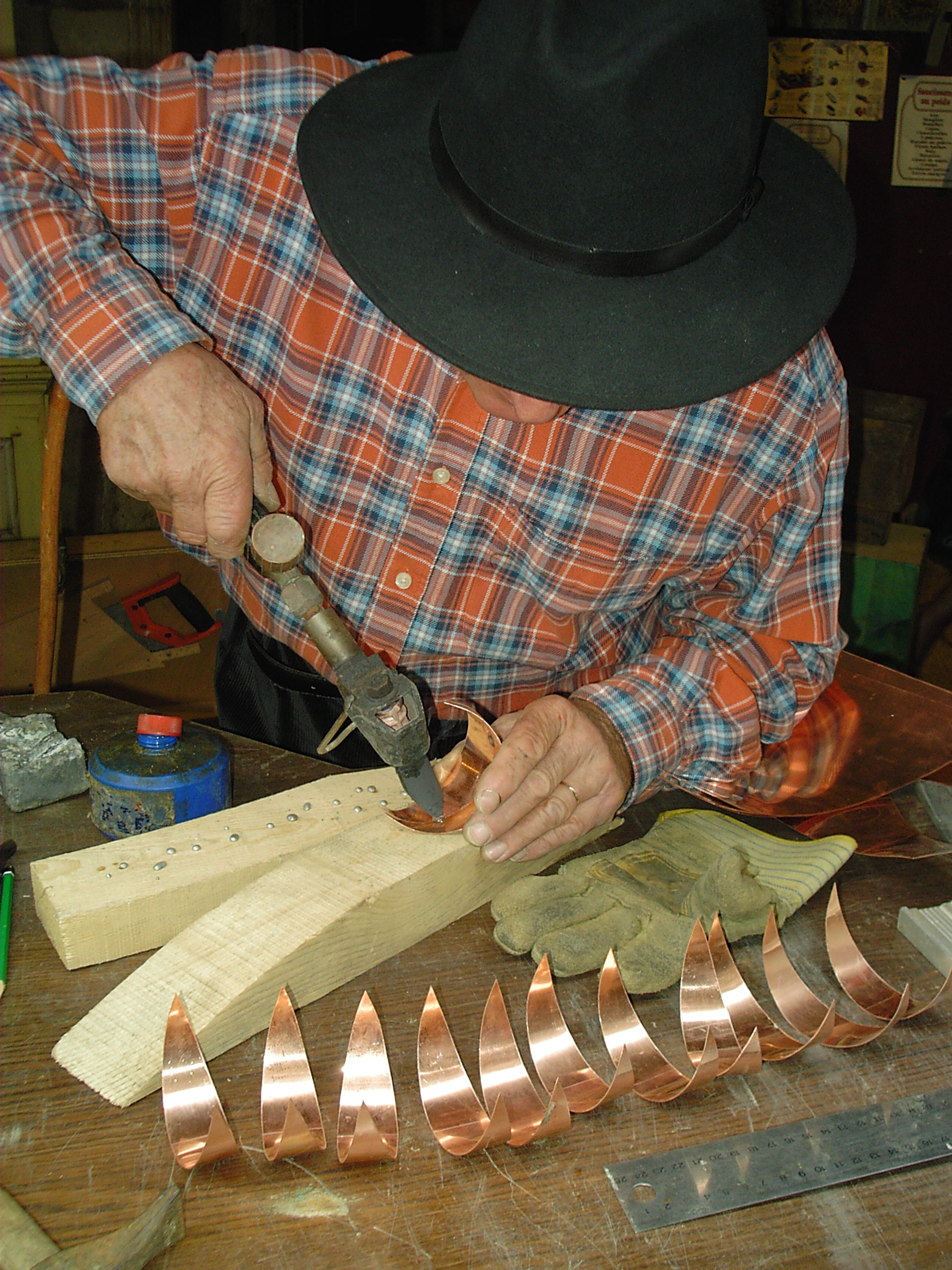 Zingueur en train de fabriquer une girouette en cuivre.